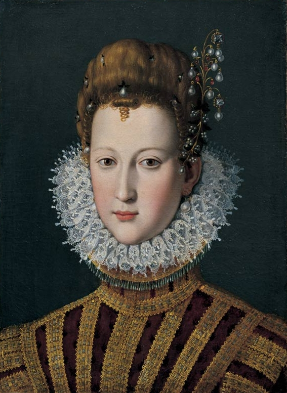 Contemporary portrait of Maria de' Medici as a young girl Santi di Tito – 1536-1603 – Mariaq de Medici ritratto giovane – Firenze – Palazzo Strozzi